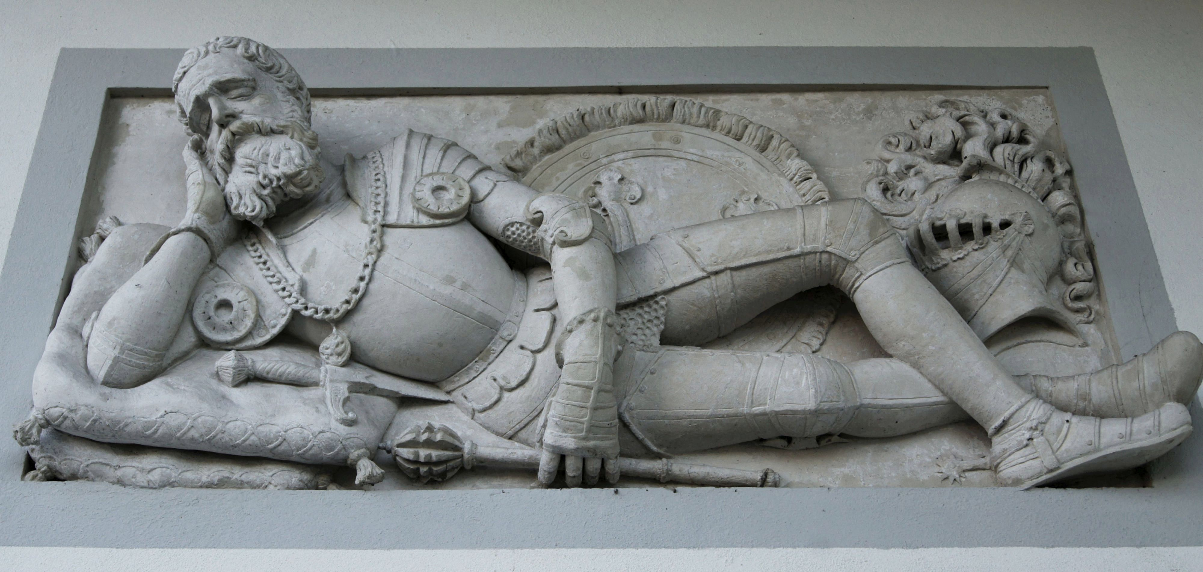 Pomnik nagrobny Andrzeja Zborowskiego w Solcu-Zdroju